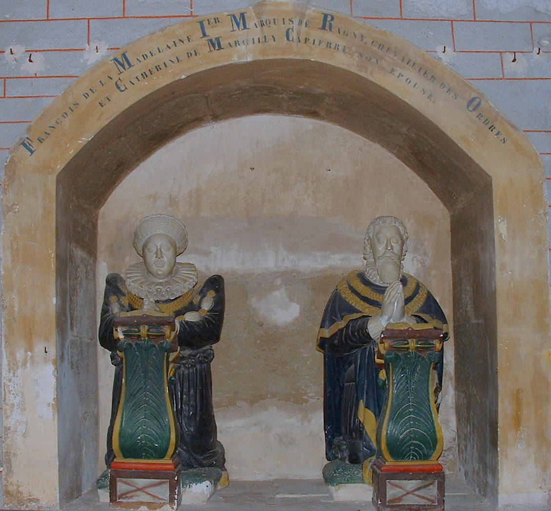 François de la Magdelaine, marquis de Ragny statues dans l'église de Savigny-en-Terre-Plaine (Yonne)